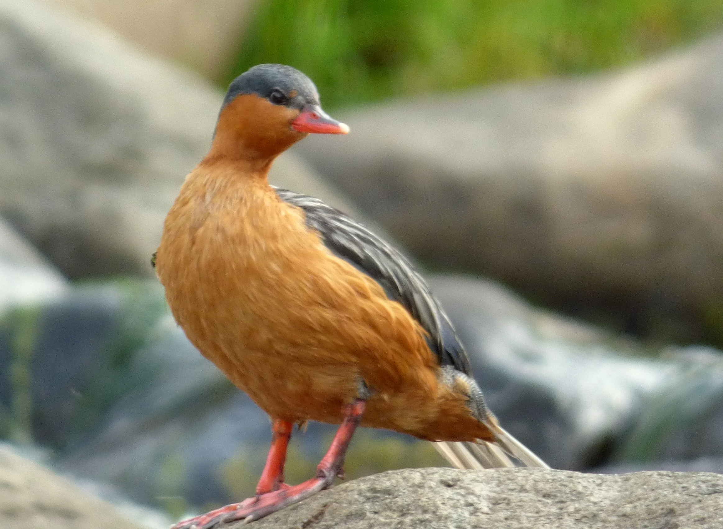 Merganetta armata (Pato de torrentes) - Hembra